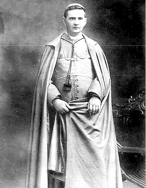 El obispo de Antofagasta Luis Silva Lazaeta (falleció en 1929)